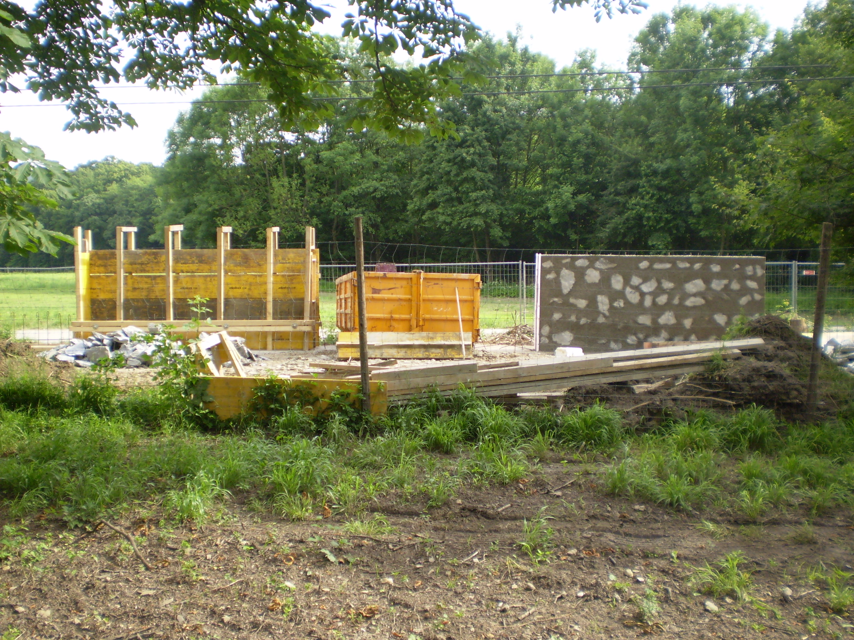 Neuerrichtung eines Teilabschnitts der Mauer des Lainzer Tiergartens südlich des Gütenbachtors.